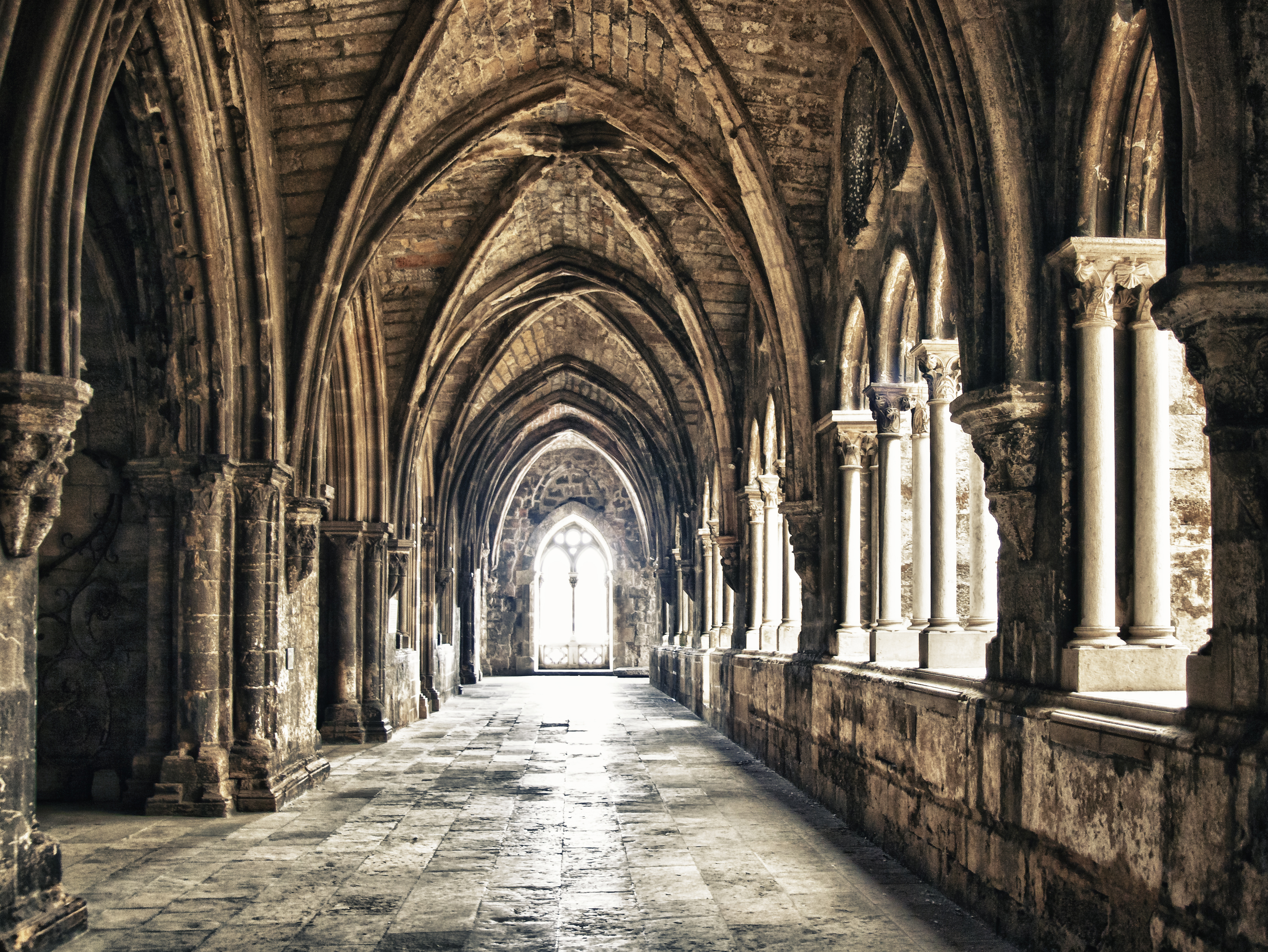 Sé de Lisboa (Igreja de Santa Maria Maior) - Lisboa/Lisbon/Lissabon - Portugal